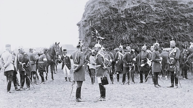 Kaisermanöver Kaisermanöver 1900 [Kaisermanöver.- Kaiser Wilhelm II. (in der Uniform der Königsjäger zu Pferde, Nr. 1) und Erzherzog Franz Ferdinand, im Hintergrund rechts: Generalfeldmarschall Graf Alfred von Schlieffen] Abgebildete Personen: Wilhelm II.: Deutsches Reich, Kaiser, II., Deutschland Schlieffen, Alfred von Graf: Generalfeldmarschall, kaiserliches Heer, Preußen, Deutschland (GND 118759396) Österreich-Este, Franz Ferdinand von: 1863-1914, Erzherzog von Österreich, Österreich